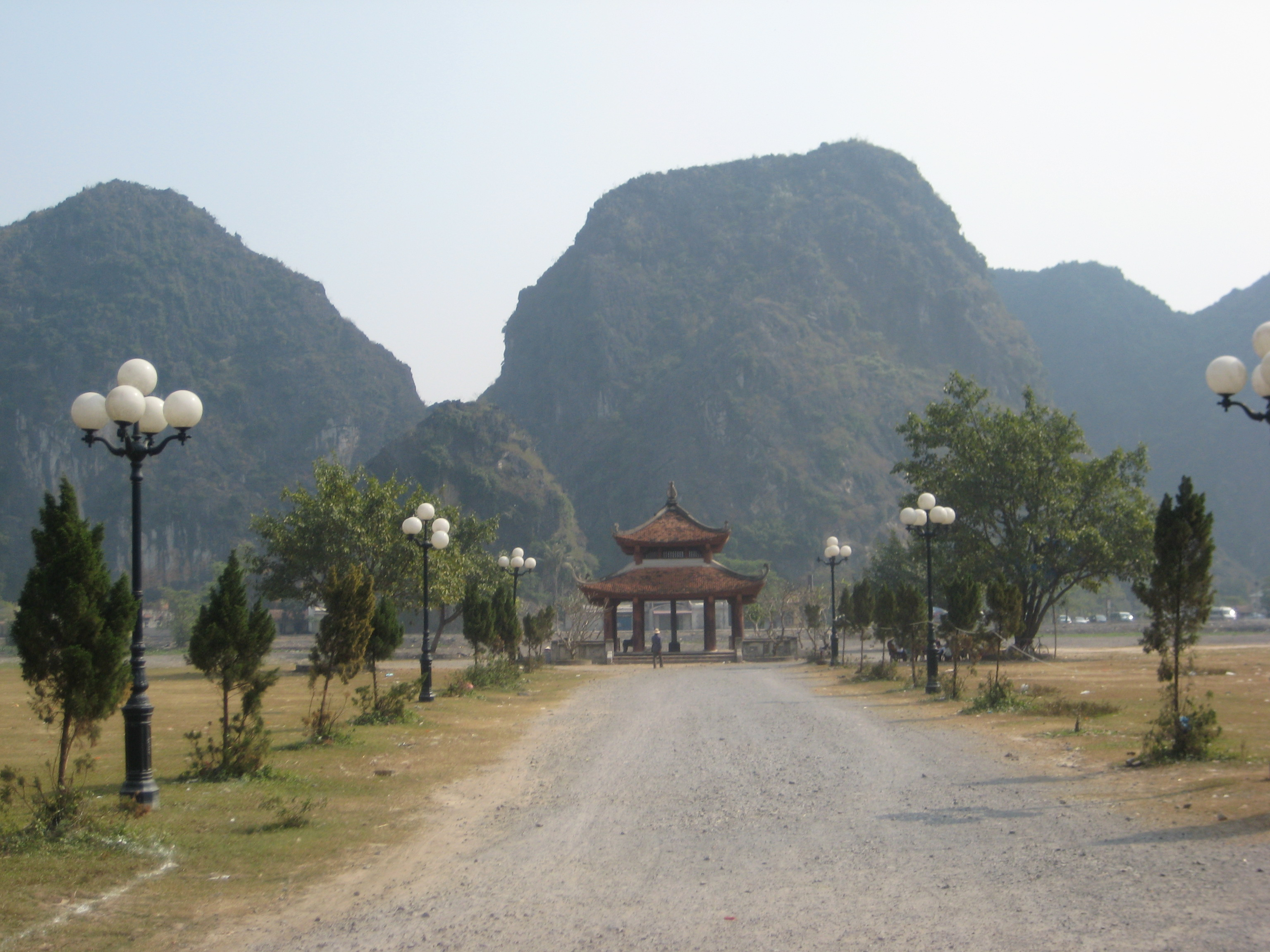 Một di tích ở Cố đô Hoa Lư